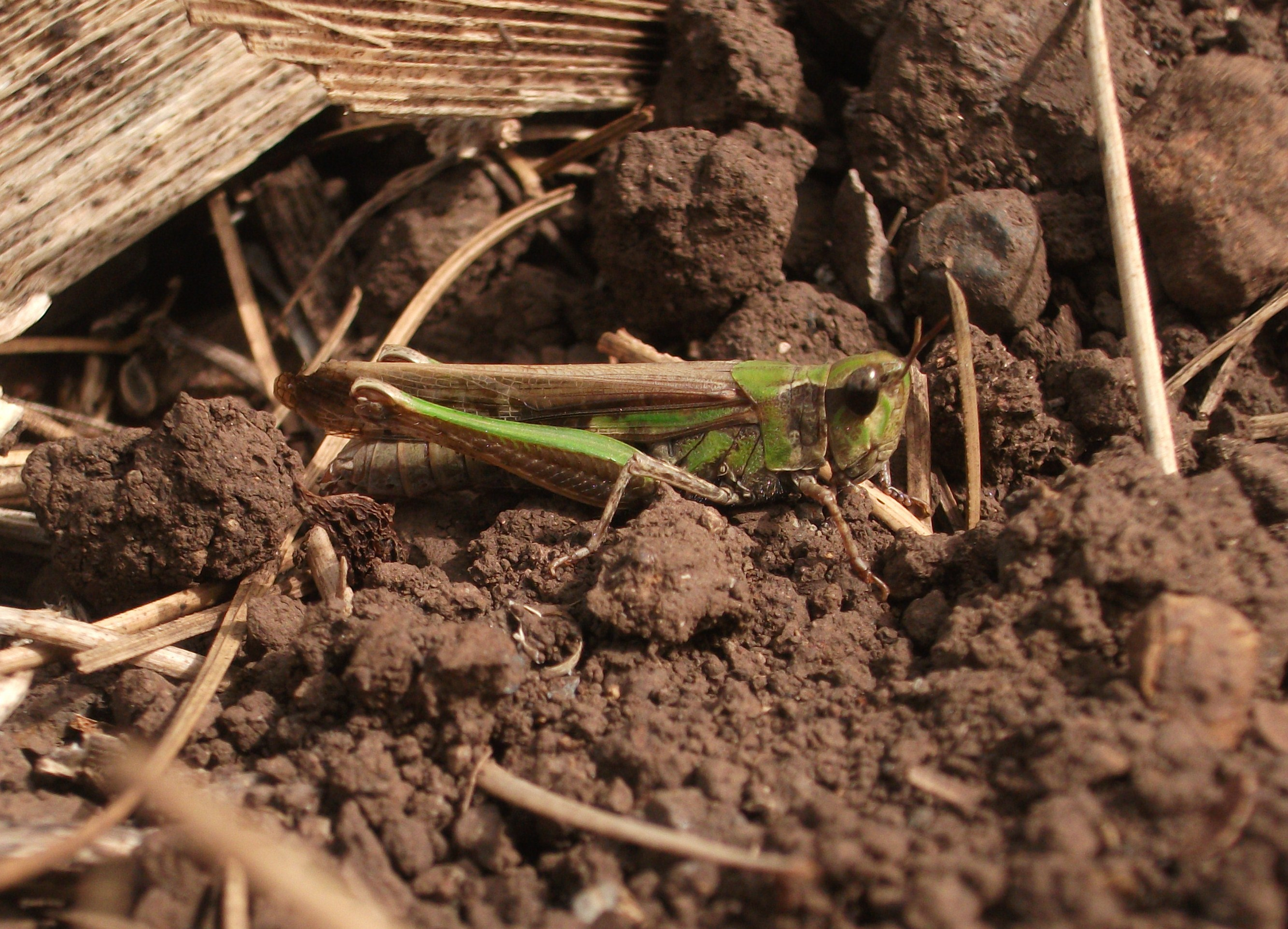 Ailopus thalassinus en Tegueste, Tenerife